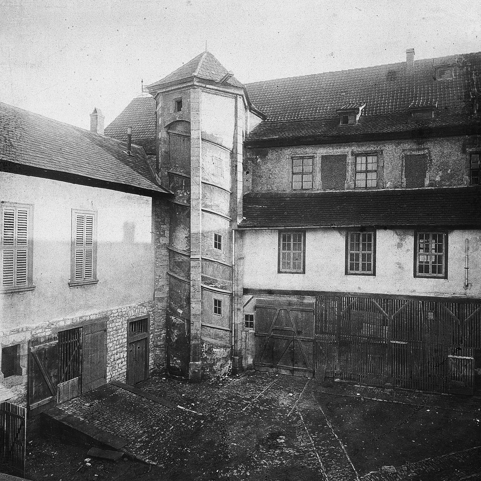 Erfurt, Tuniergasse 17 Treppenturm 1870